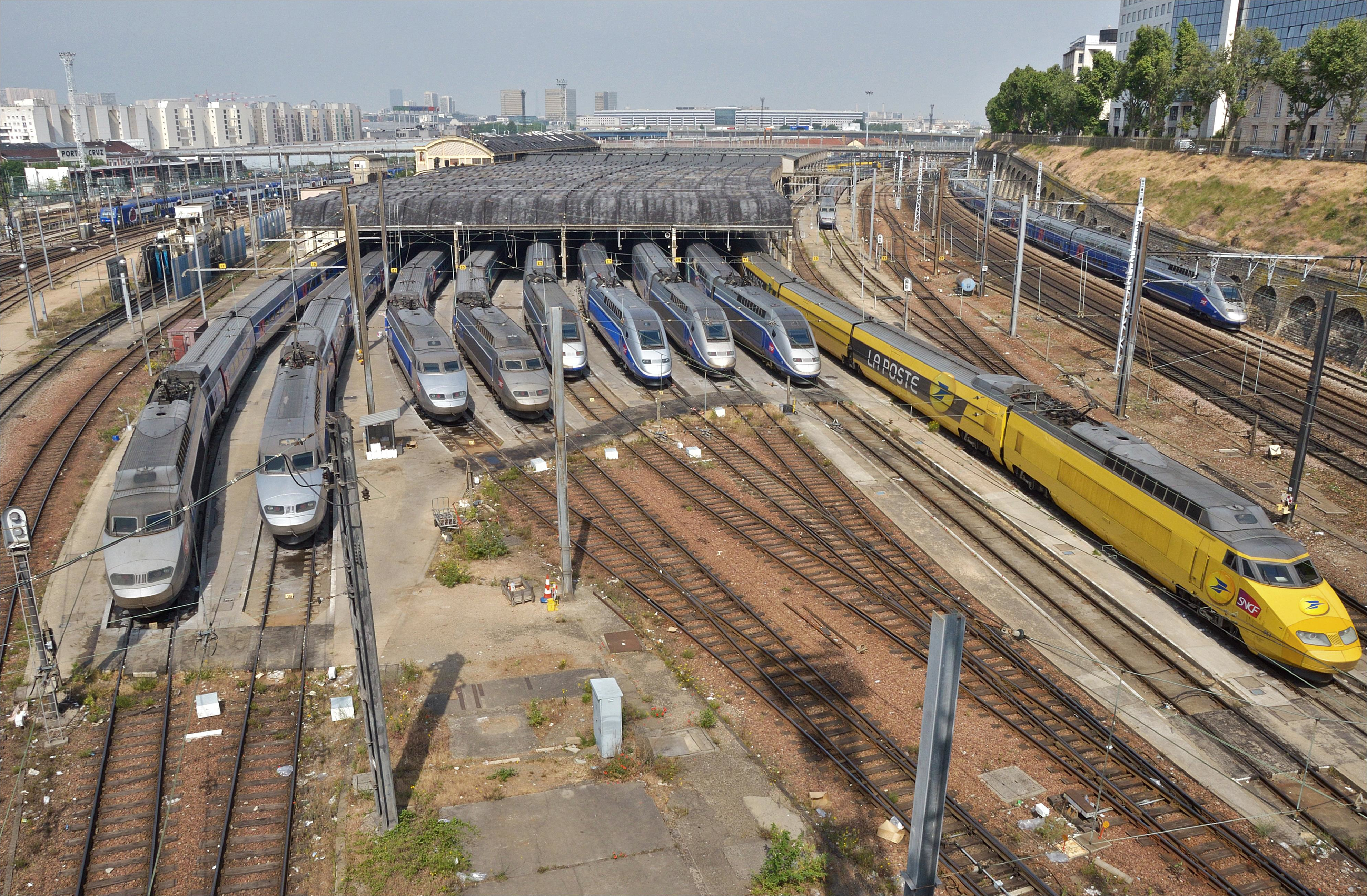 SNCF Technicentre Sud Est Européen.